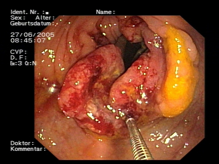 de: Bildbeschreibung: Während einer Koloskopie aufgenommenes Foto eines Karzinomes des Colon ascendens. Mit dem Instrument am unteren Bildrand wird eine Biopsie entnommen. Fotograf: Selbst angefertigt von Benutzer:Doktor silke Datum: 27.09.2005 andere Versionen: nein en: Description: during a colonoskopy made image of a carcinoma of the colon ascendens with the tool, which can be seen at the lower border is used for a biopsy Photographer: Doktor silke Date: 2005/09/27 Older versions: none